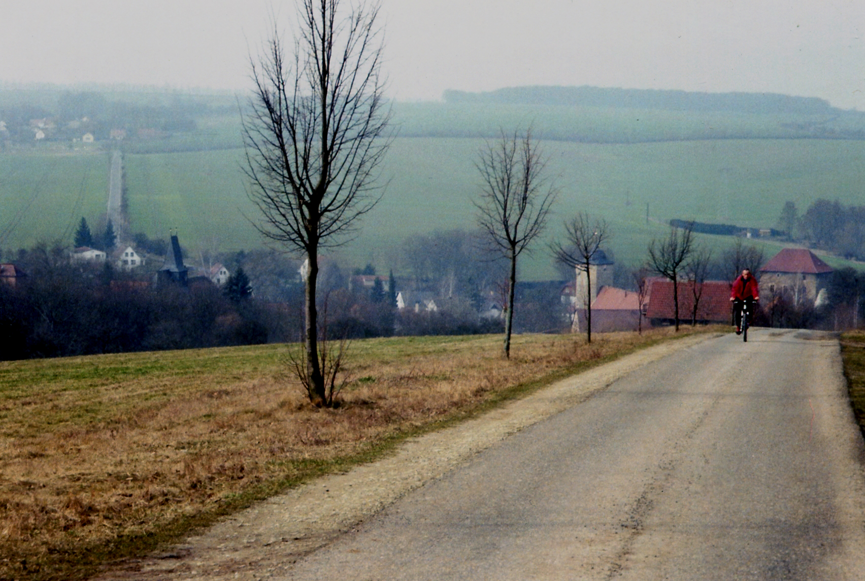 Kapellendorf liegt in einem scharf eingeschnittenen Tal.